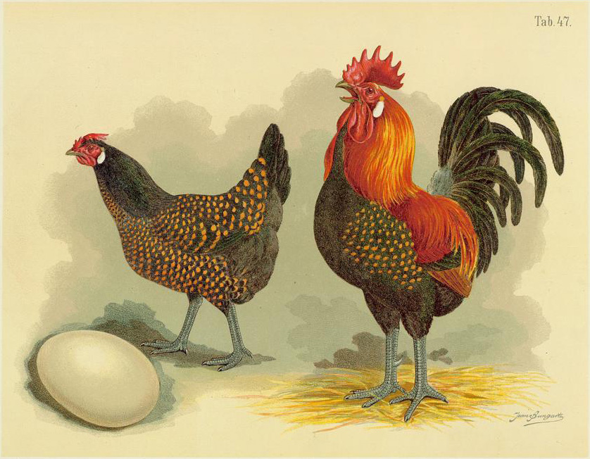 Bergisches Kräher-Huhn. Gallus dom. montensis.